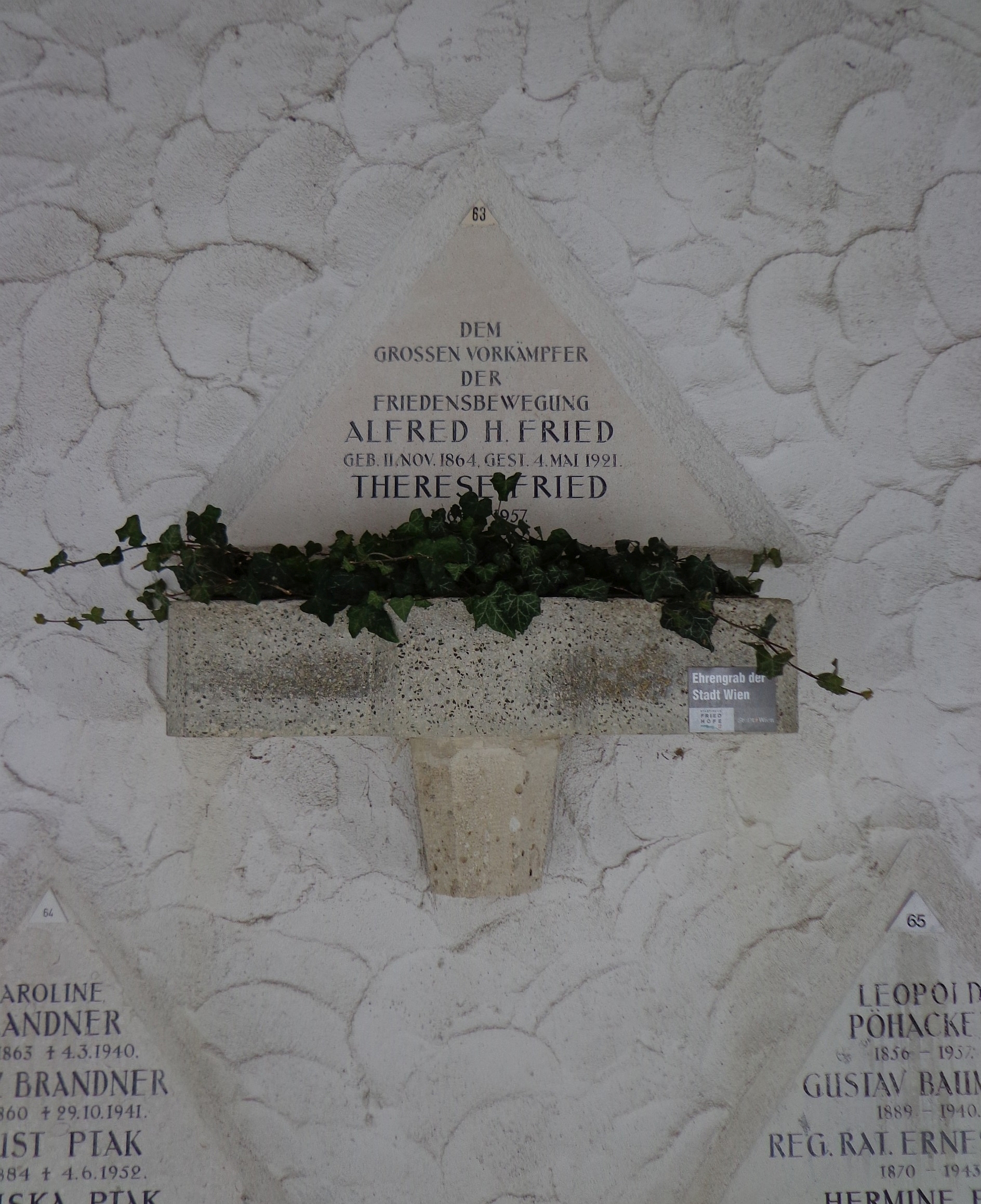 Feuerhalle Simmering - Arkadenhof (Abteilung ALI) - Urnengrab des Friedens-Nobelpreisträgers Alfred Hermann Fried